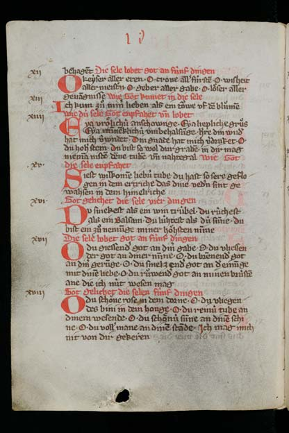 Cod. Eins. 277, rote Initialen und Randglossen, F. 7v